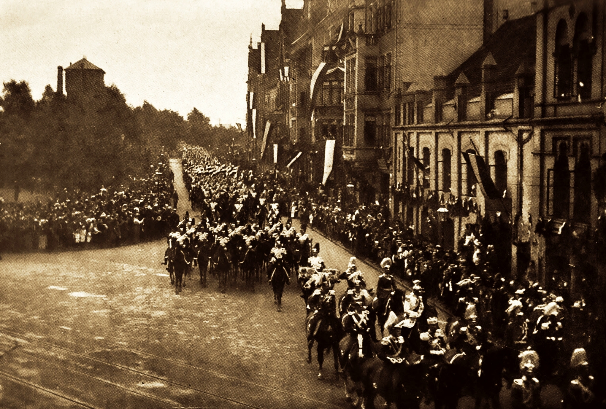 Die Regimenter kehren von der Kaiserparade am 27. August 1907 am Kronsberg nach Hannover zurück.